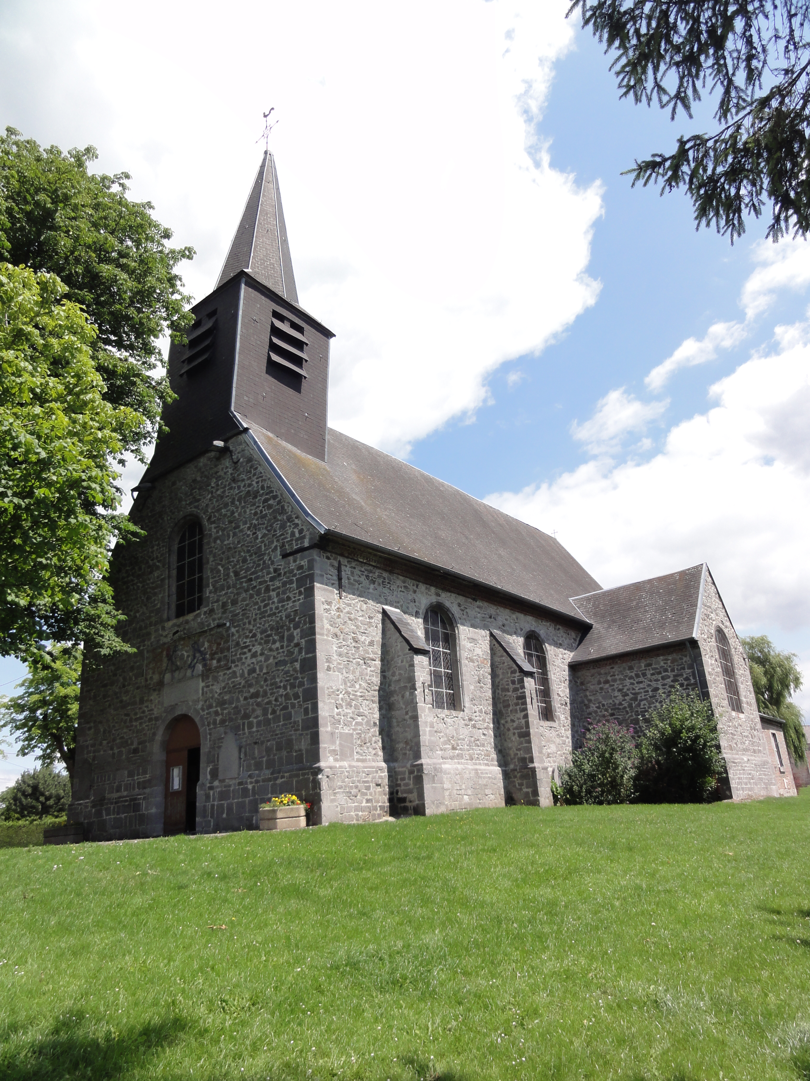 Bachant (Nord, Fr) église, exterieur